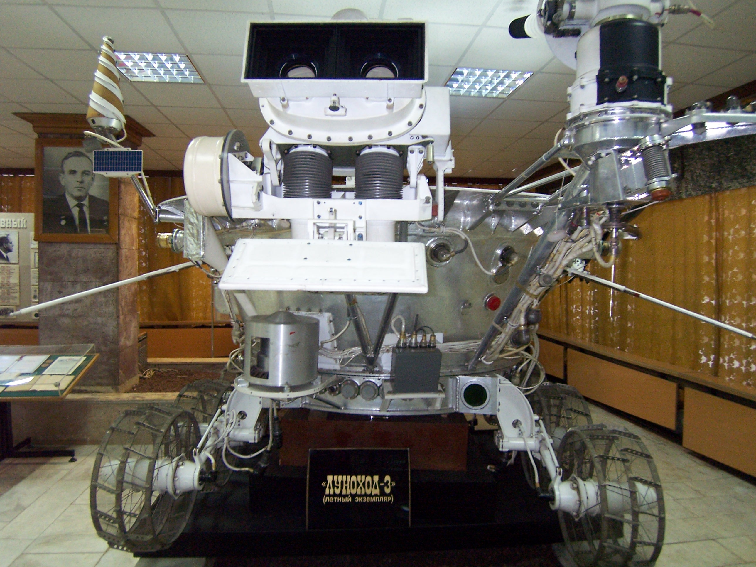 Фото "Лунохода-3", так и не полетевшего в космос и находящегося в музее НПО имени Лавочкина в Химках